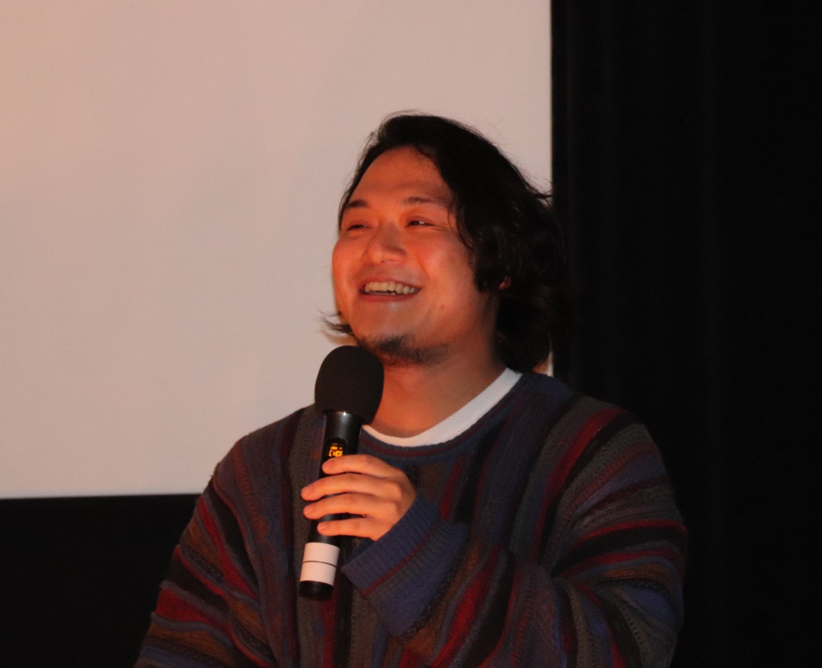 横浜光音座「強がりカポナータ」舞台あいさつ（2020年1月）監督：横山翔一